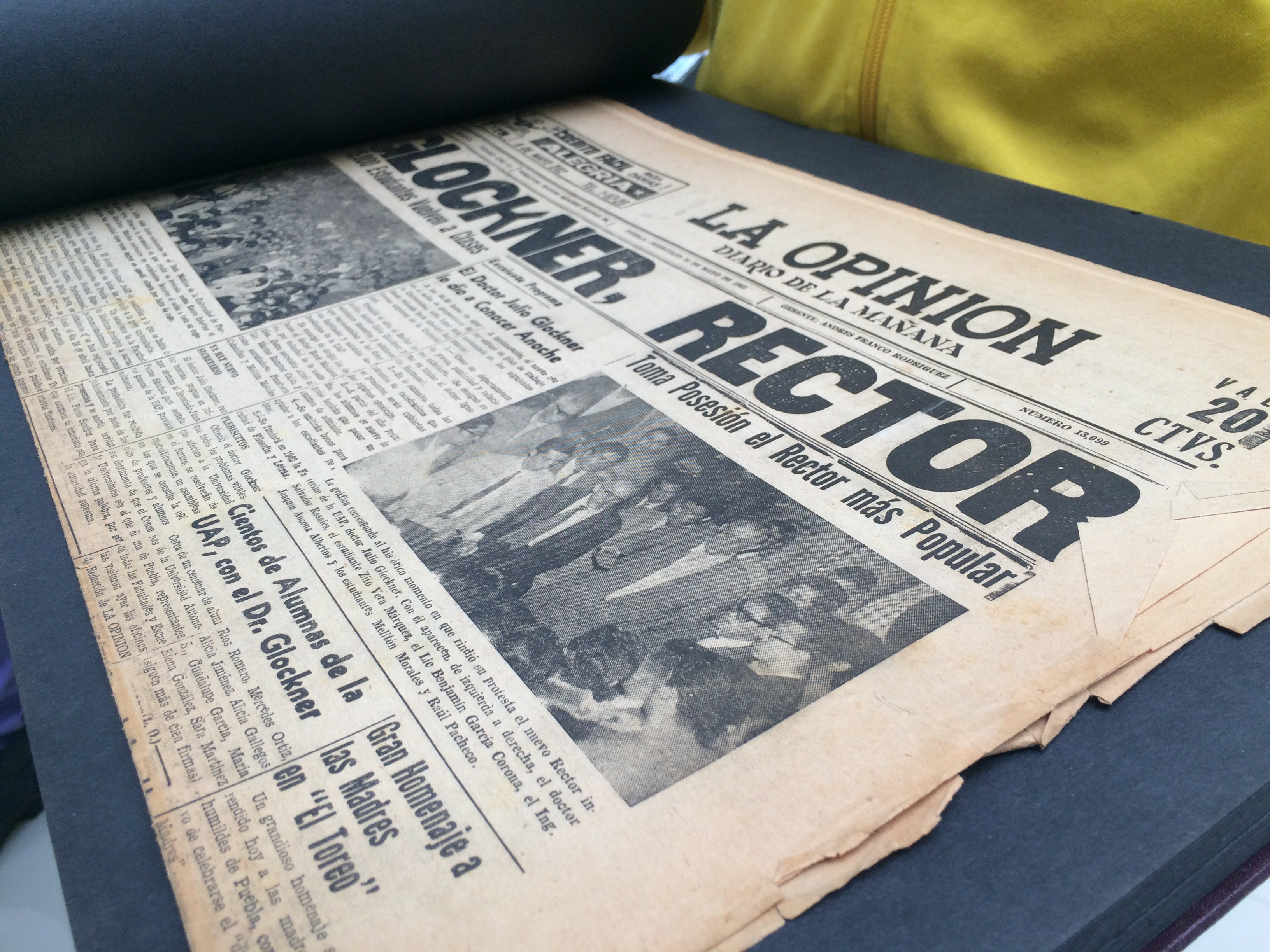 Diario que anuncia la designación de Julio Glockner como rector de la BUAP en 1961. Primer Editatón de la BUAP, en Puebla, Puebla. 13 de diciembre de 2014.